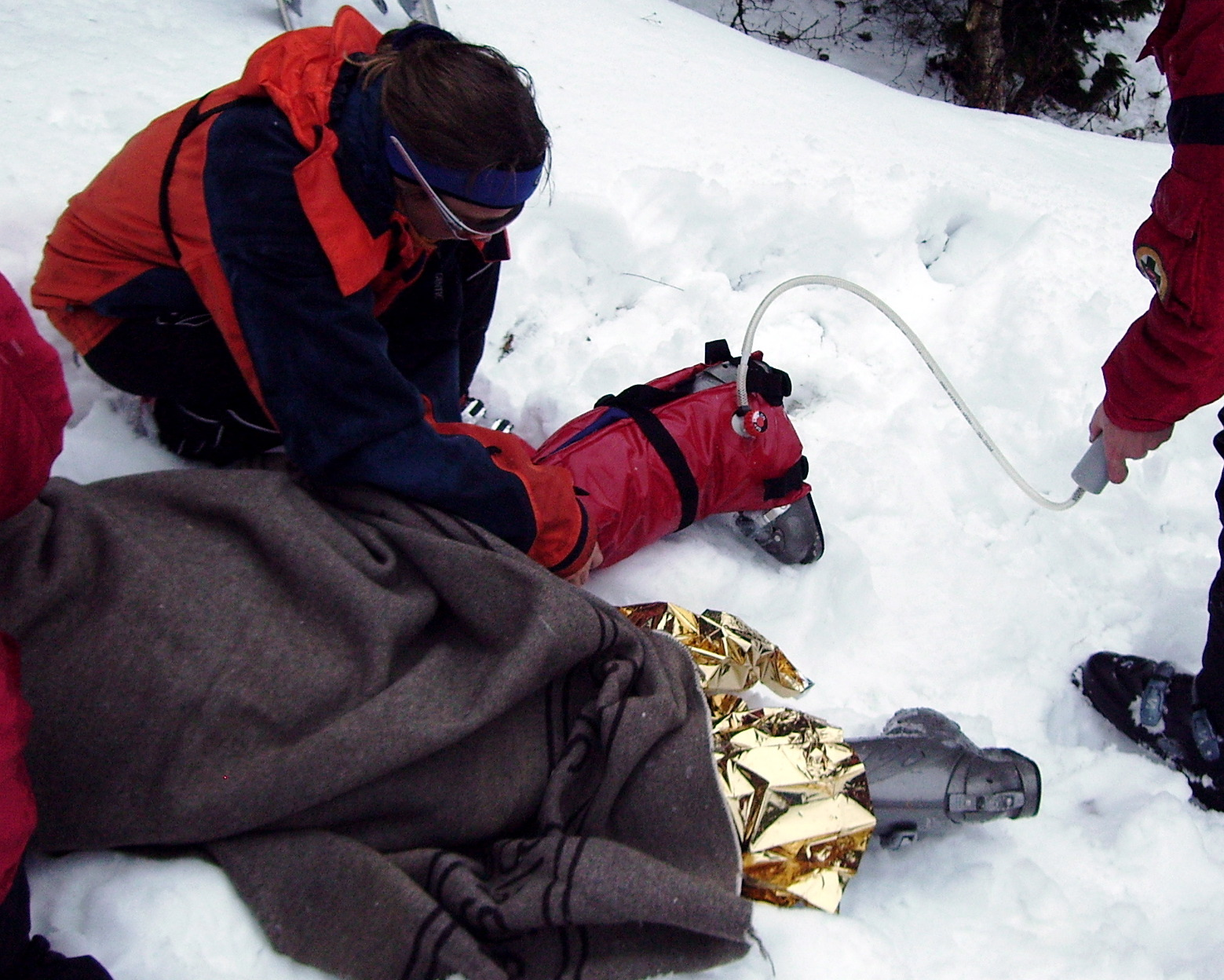 Vakuumschiene, Vakuumbeinschiene - Skifahrer wird mit Vakuumschiene am Unterschenkel versorgt vacuum leg splint